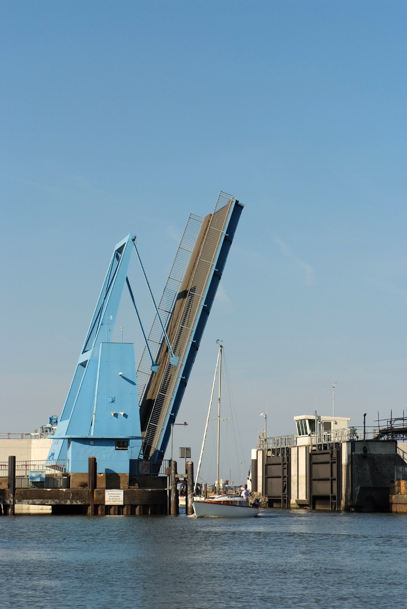 Klappbrücke im Hafen von Cuxhaven, Zollkaje